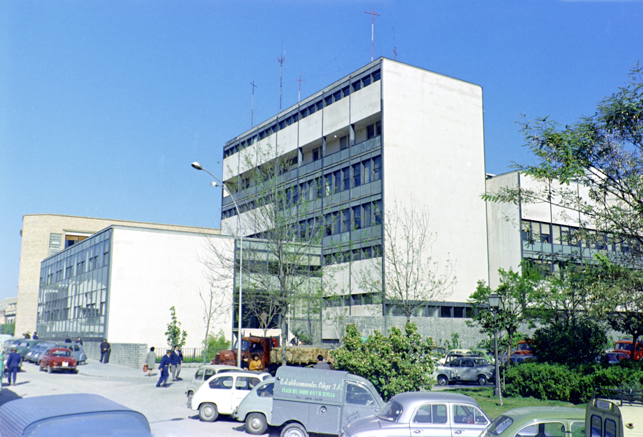 El edificio de la Jefatura Superior de Policia de Sevilla (1962) es una obra del arquitecto wːesːRamón Montserrat Ballesté; el edificio se incluye en el registro del Movimiento Moderno de wːesːDoCoMoMo Ibérico.